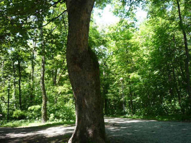 Drzewo w gliwickim Parku Kultury i Wypoczynku.